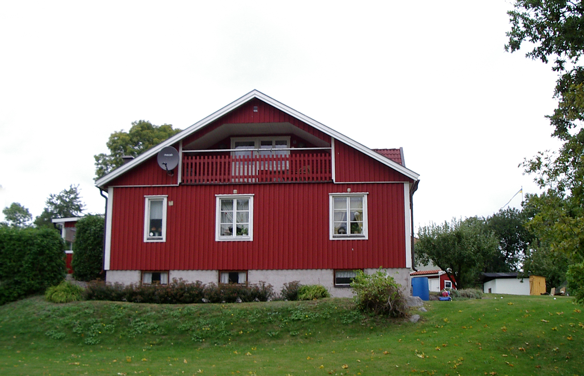 Architektura Szwecji - Gunnebo Autor: Ssawka Grafika udostępniona na licencji GFDL